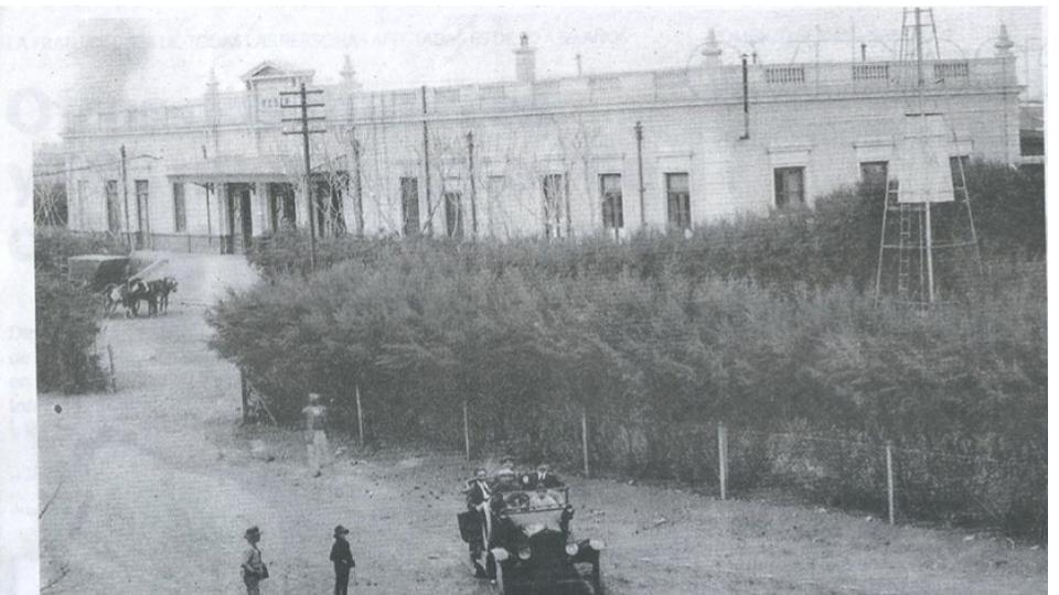 Primeras imagenes de la Estación de Trenes en Justo Daract